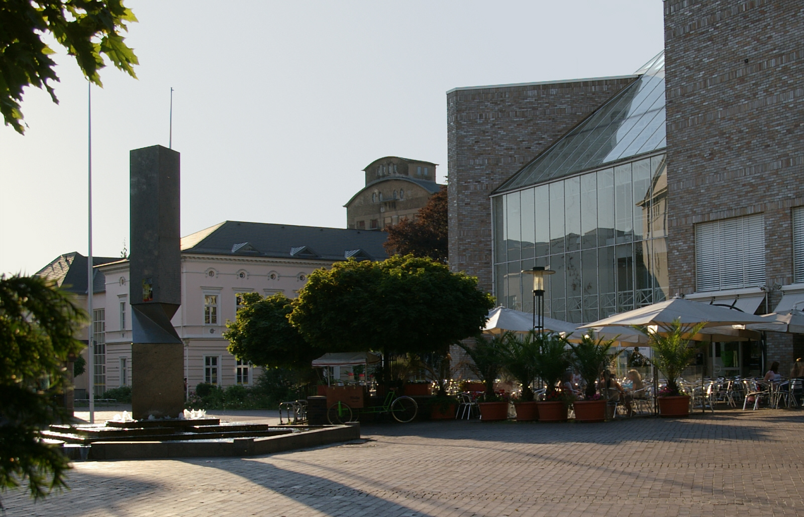 Unna (Nordrhein-Westfalen), Rathausplatz in der Abendsonne mit Brunnenskulptur von Carlernst Kürten. Im Hintergrund die renovierte Hauptpost und Mühle Bremme.